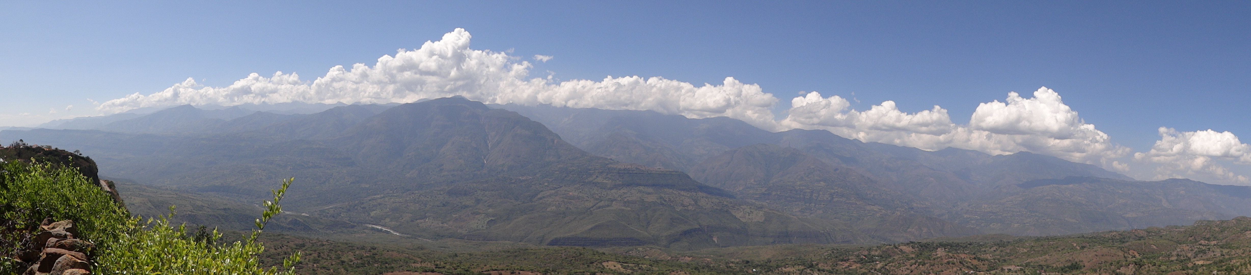 Foto tomada desde el mirador de Barichara (Santander)